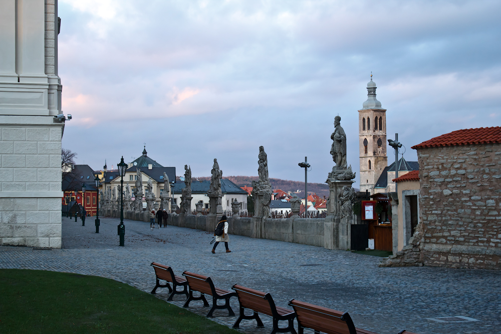 Sousoší na terase před jezuitskou kolejí, Kutná Hora